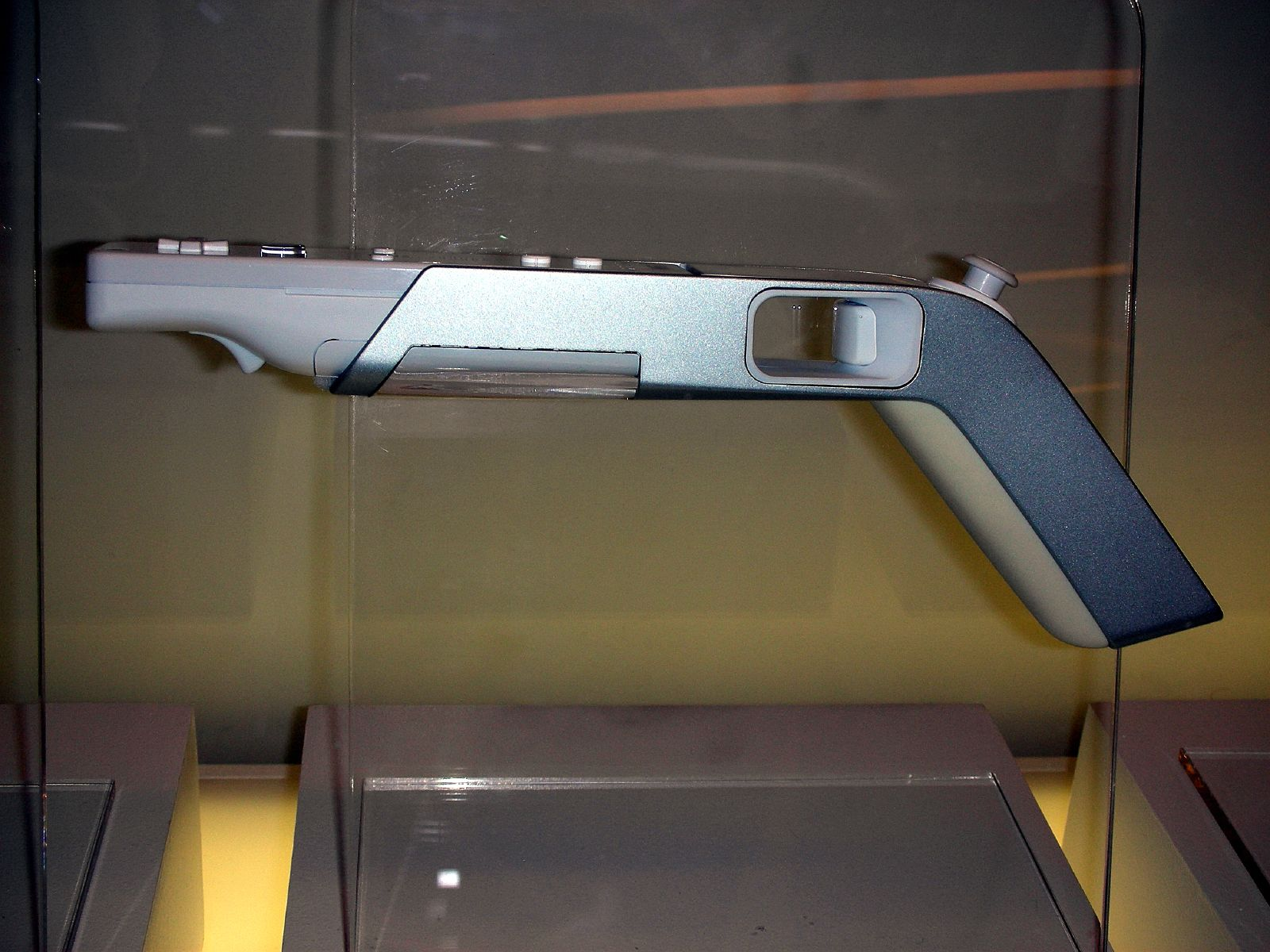 El mando, adaptado para juegos de tipo shooter